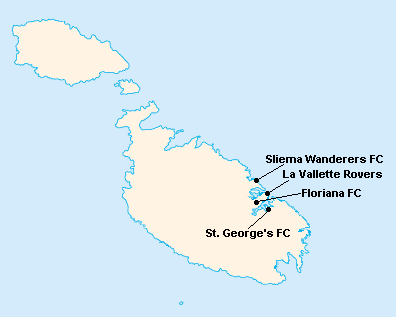 Répartition des clubs en First Division Maltaise 1926-1927.